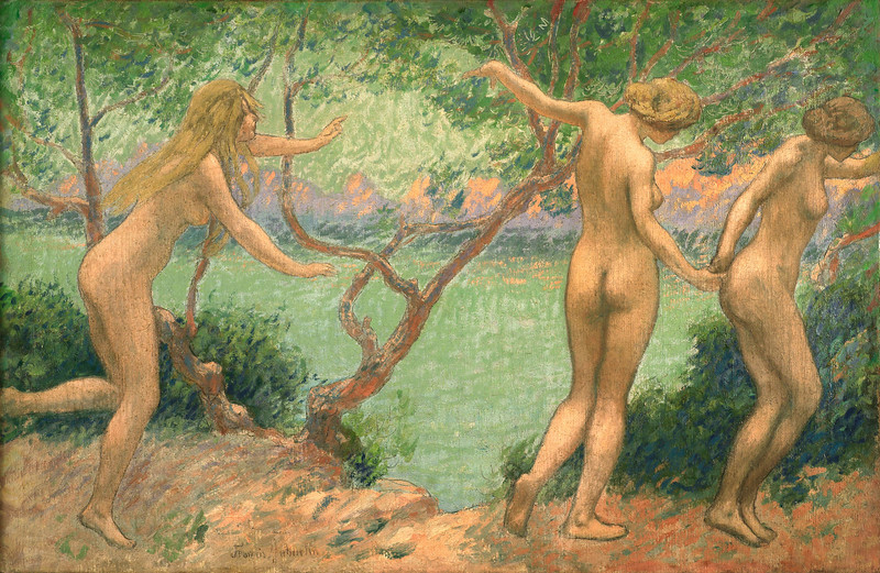 Les trois grâces à Porqurolles